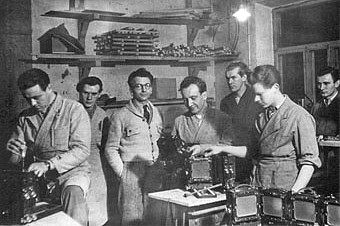 Szilárd Szabad med sina medarbetare i verkstaden på Malmskillnadsgatan